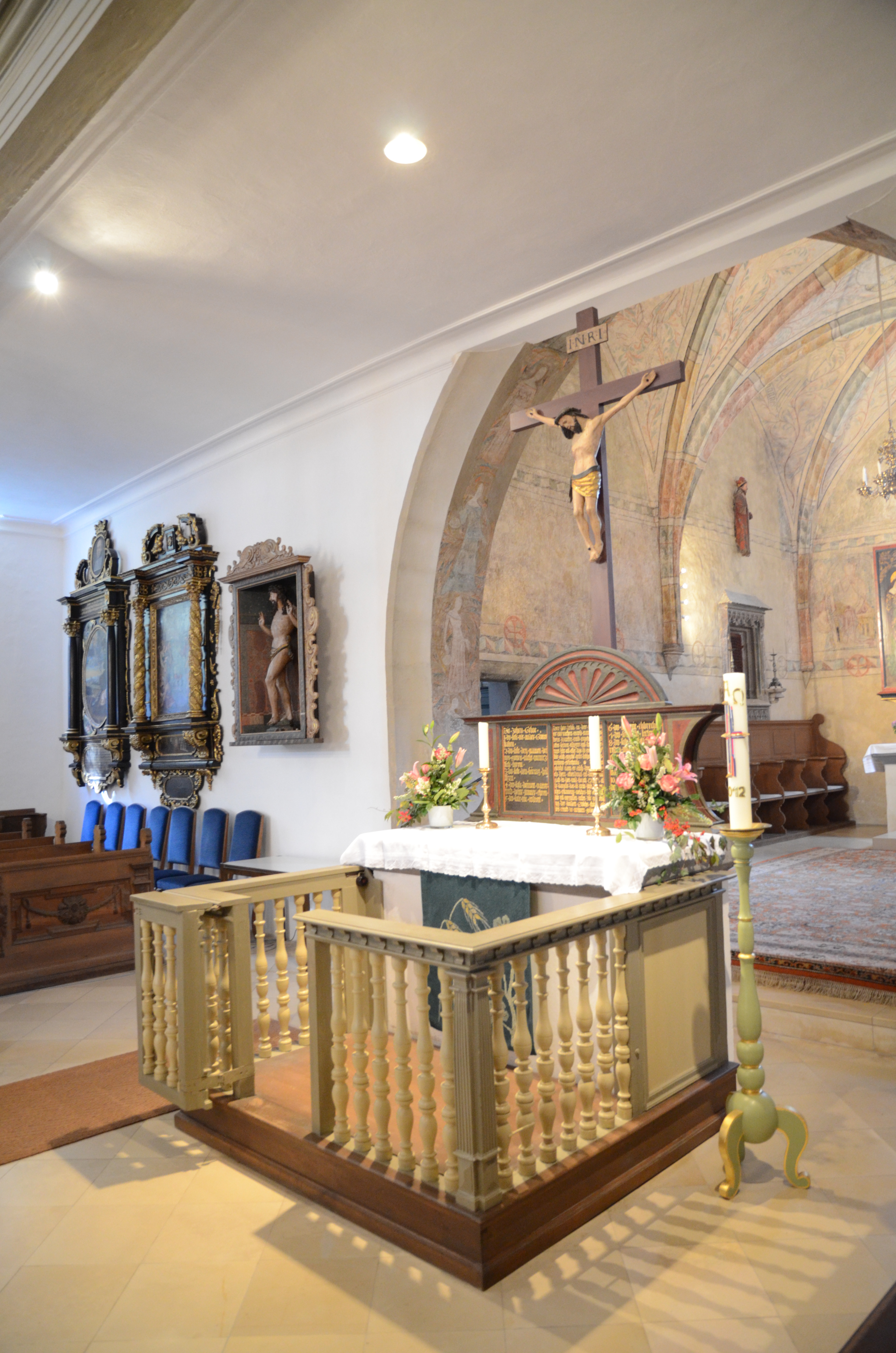 Spitalirche in Dinkelsbühl, Innenausstattung